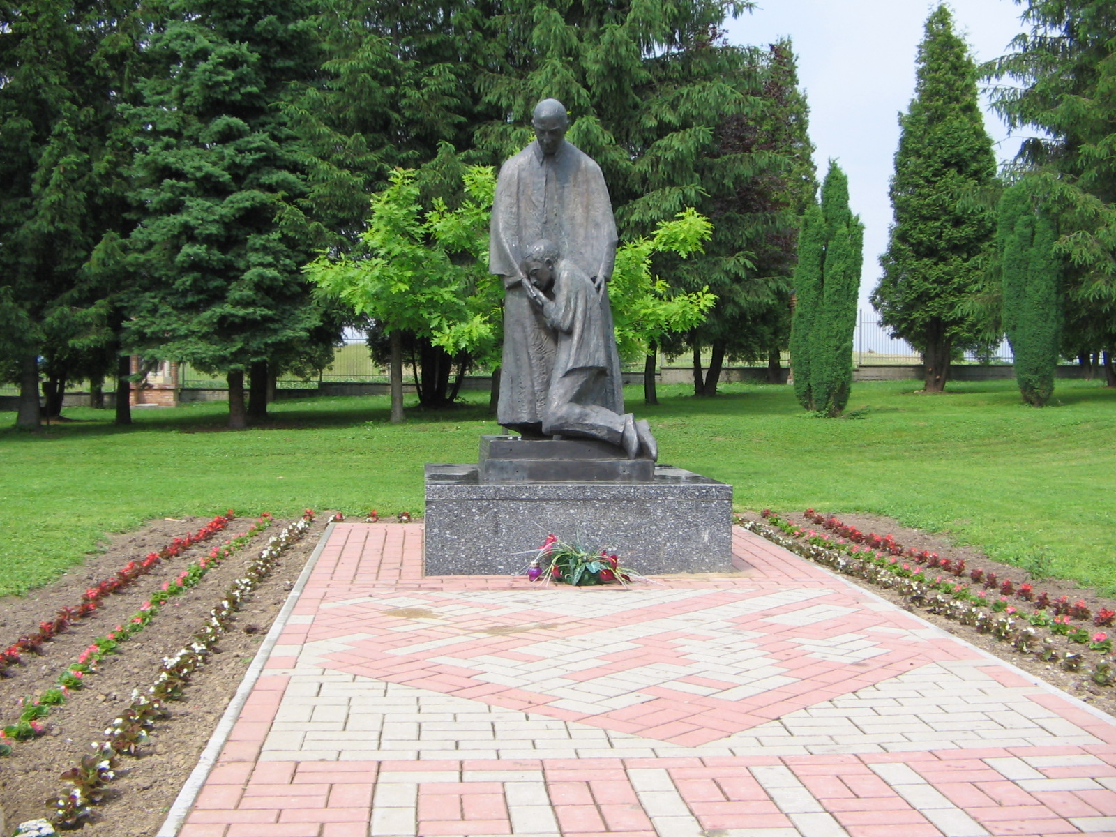 Pomnik Bł.ks.Bronisława Markiewicza w Miejscu Piastowym